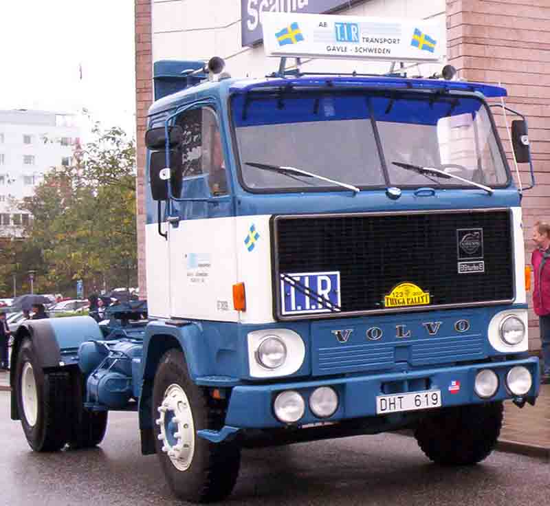 Volvo F89-38 4x2 Truck 1973